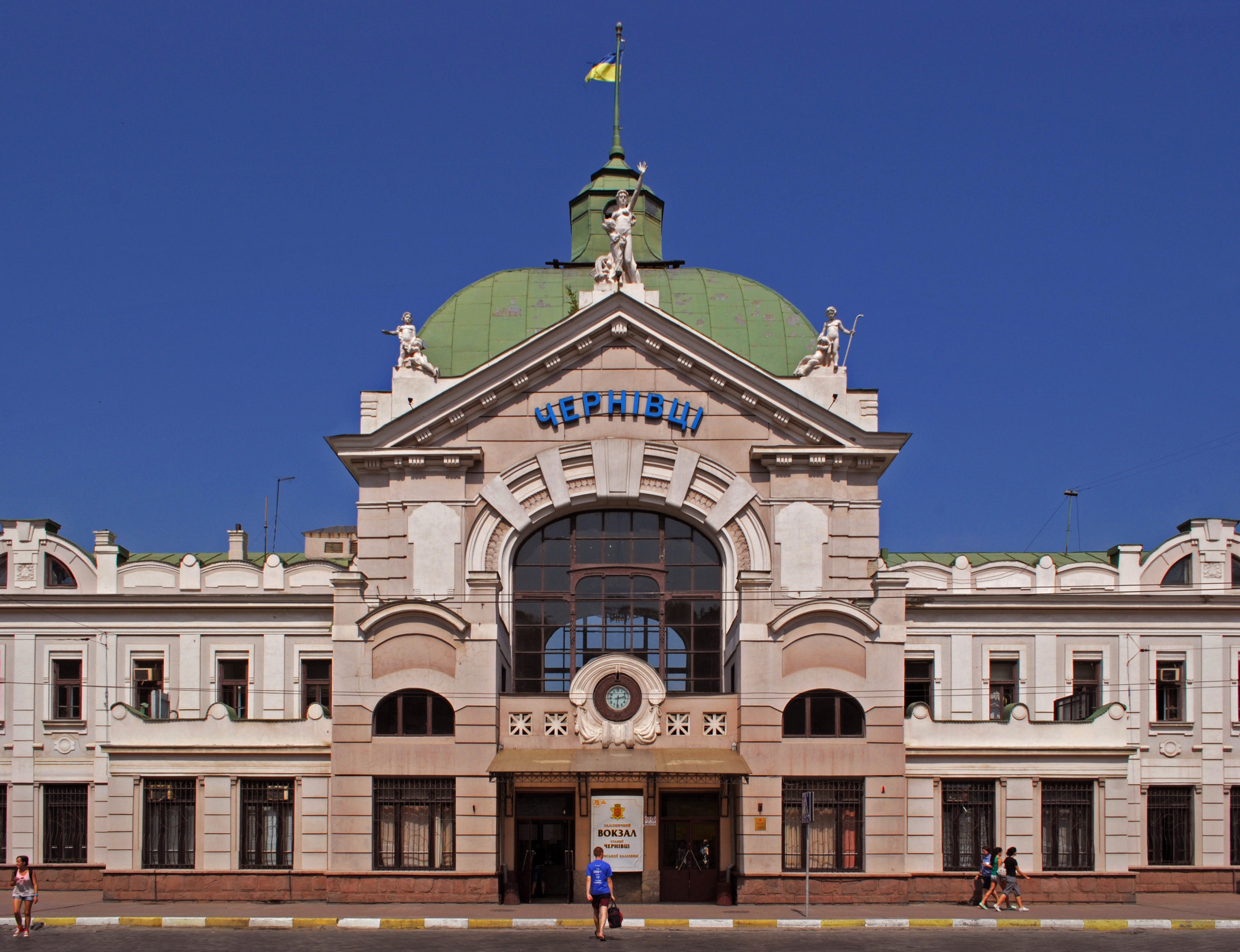 Залізничний вокзал, Чернівці, Гагаріна Юрія, 38